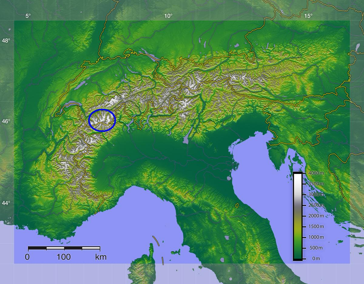 Пеннинские Альпы на карте Альп